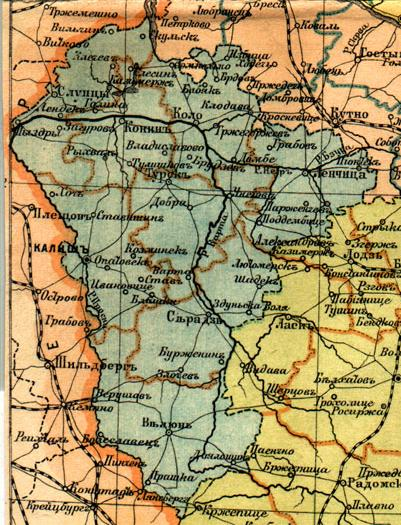 Калишская губерния в 1896 году.